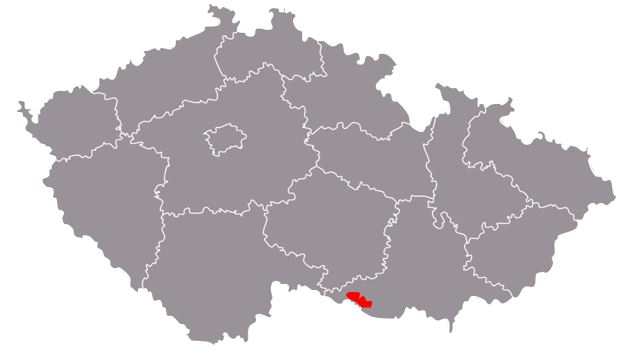 Přibližné rozšíření čolka dravého na území České republiky, podle Obojživelníci a plazi České republiky (Zwach), použitá mapka je Cesko-kraje.svg.